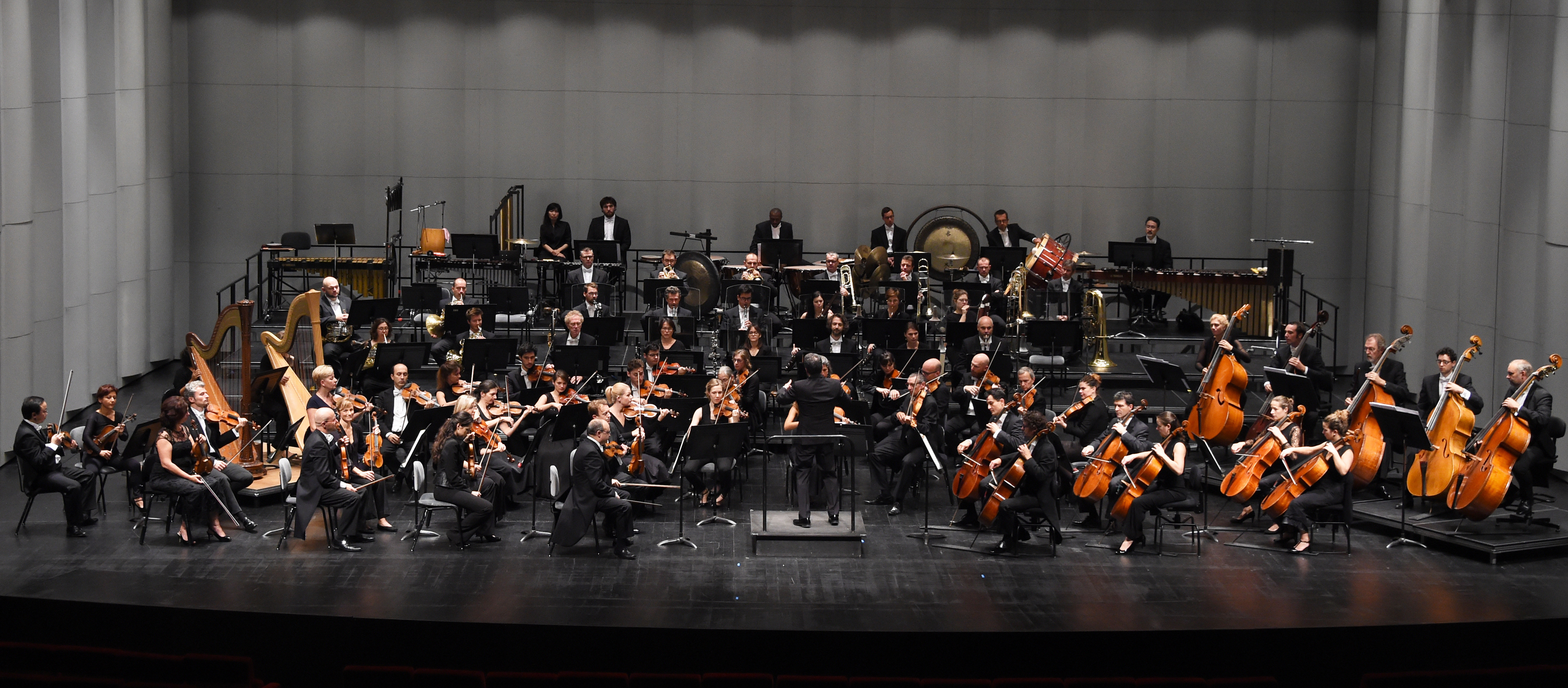 Photo prise en octobre 2018 par Catherine Kohler, photographe